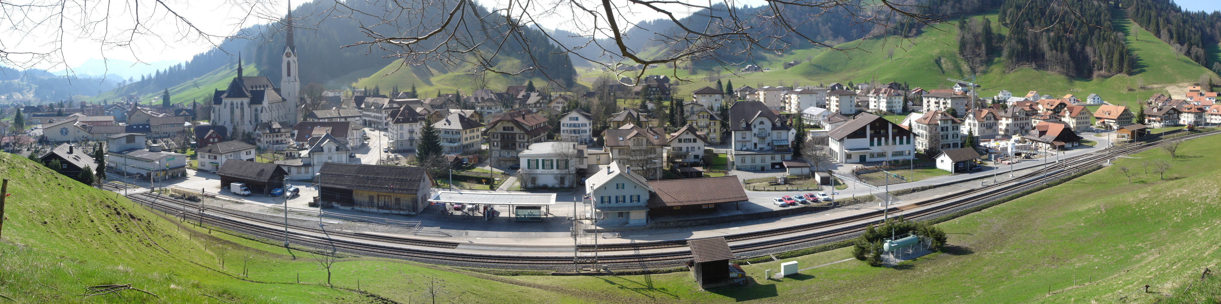 Gemeinde Escholzmatt Panoramaansicht des Dorfes vom Lindenhügel aus Erstellt: 4.3.2005 (für die GNU-FDL)